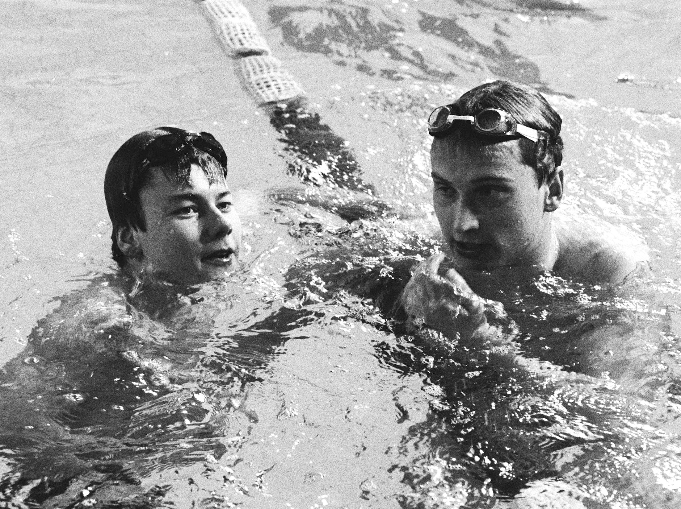 Nationale Zwemkampioenschappen in Zutphen. 10 Frank Dorst in aktie, 11.12.13 Frank Dorst (l.) en Gerard de Kort